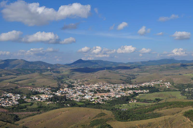 Vista da cidade